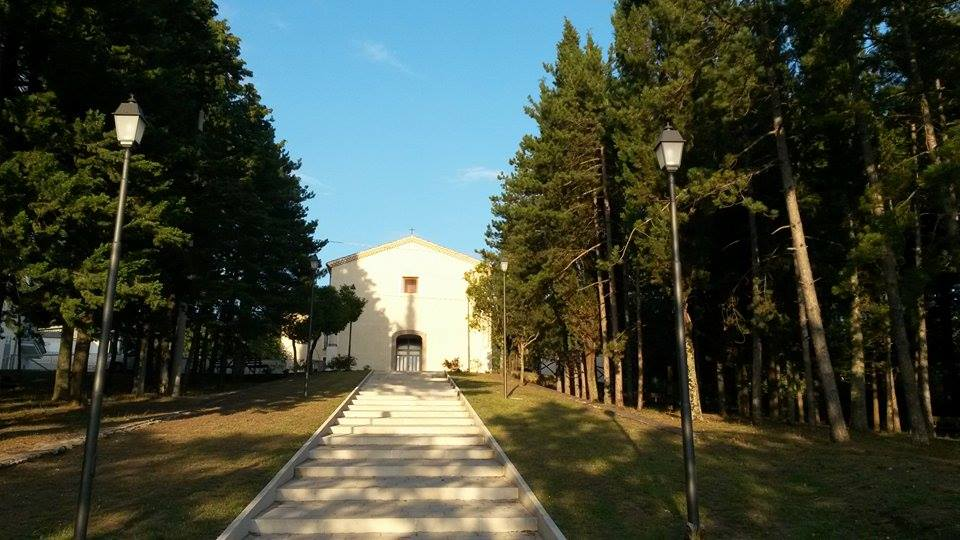 Chiesa della Maddonna delle grazie a Satriano di Lucania